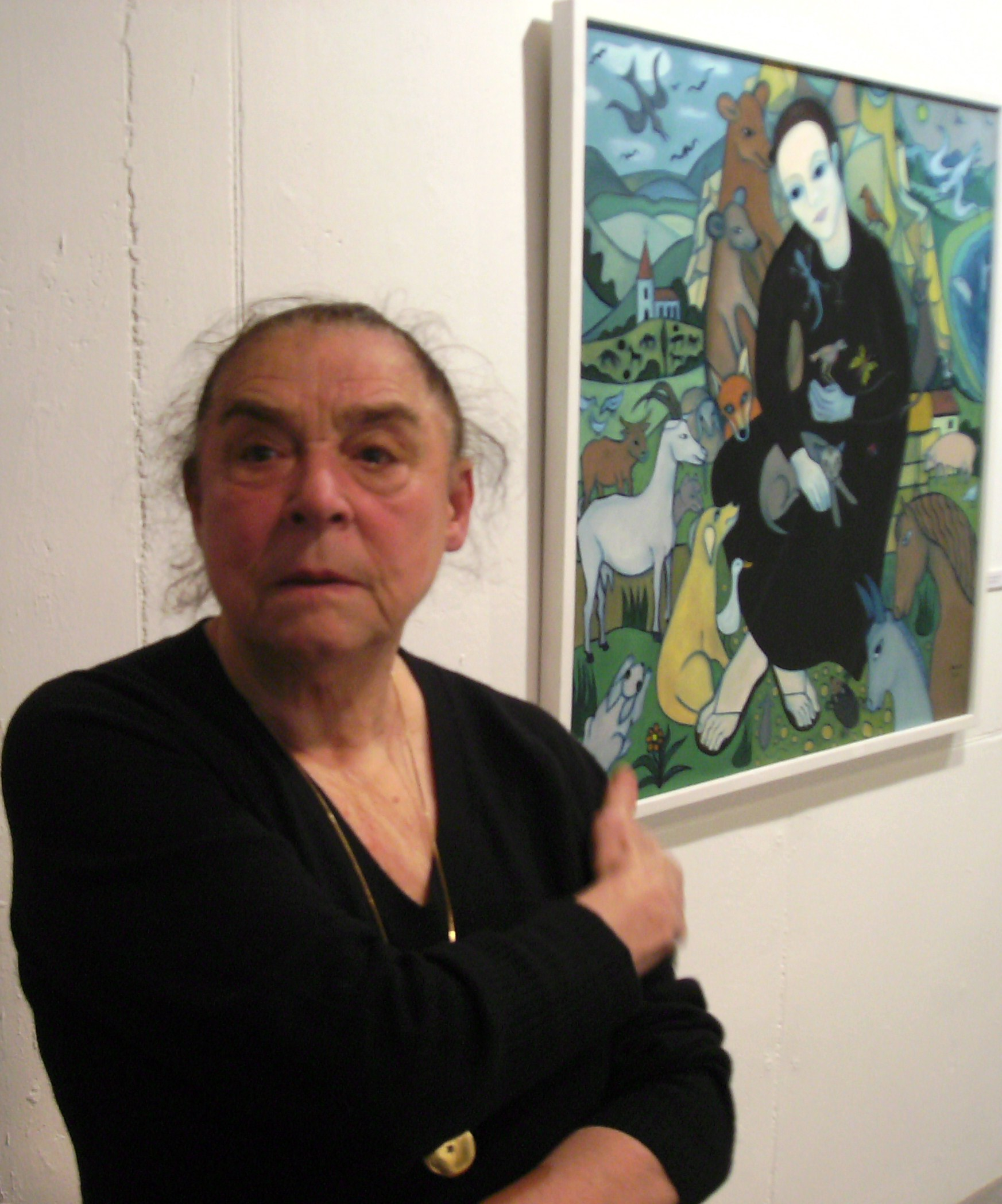 Marianne Aatz: Portrait vor einem ihrer Gemälde